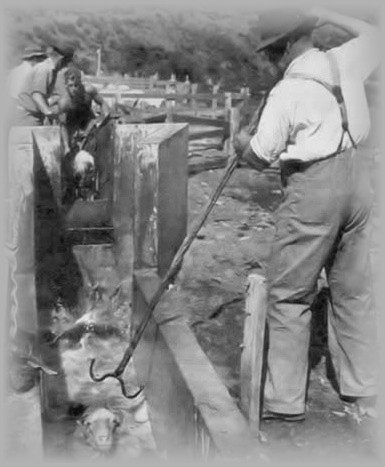 Plunge dipping sheep